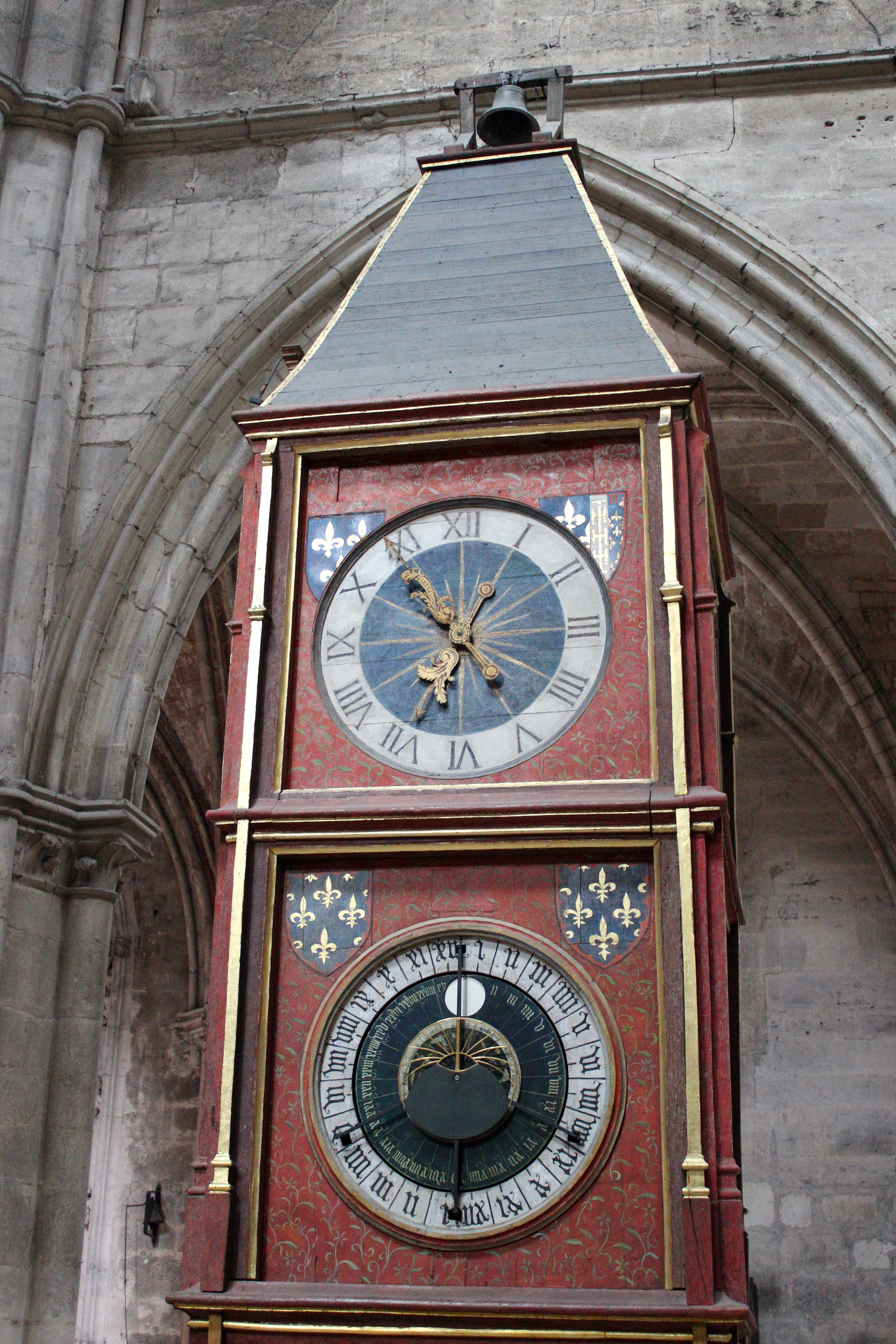 Cathédrale Saint-Étienne de Bourges. Horloge astronomique (1424) de Jean Fusoris